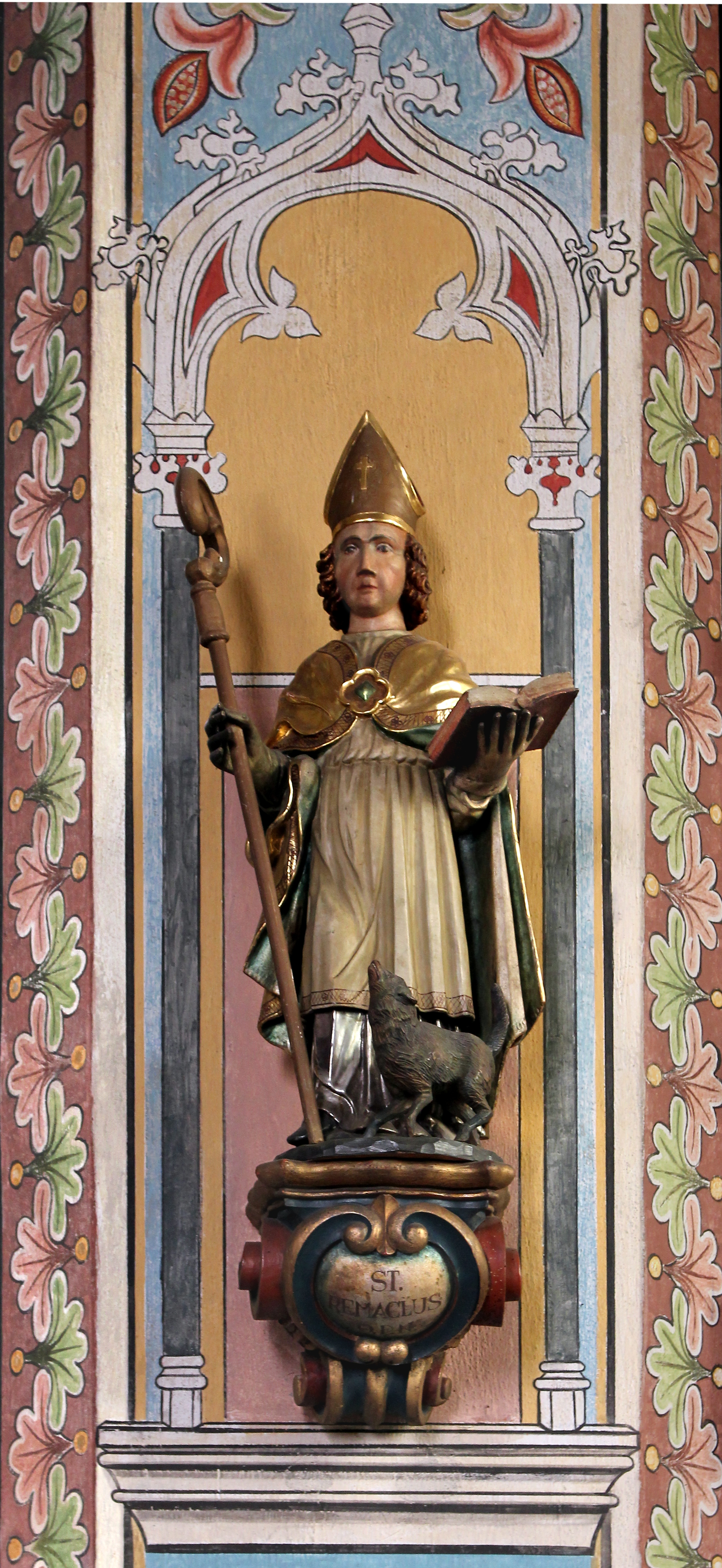 St. Remaclus, Statue in der ihm geweihten Pfarrkirche von Waldorf im Vinxtbachtal, wahrscheinlich 19. Jahrhundert (Bau der Kirche 1869)